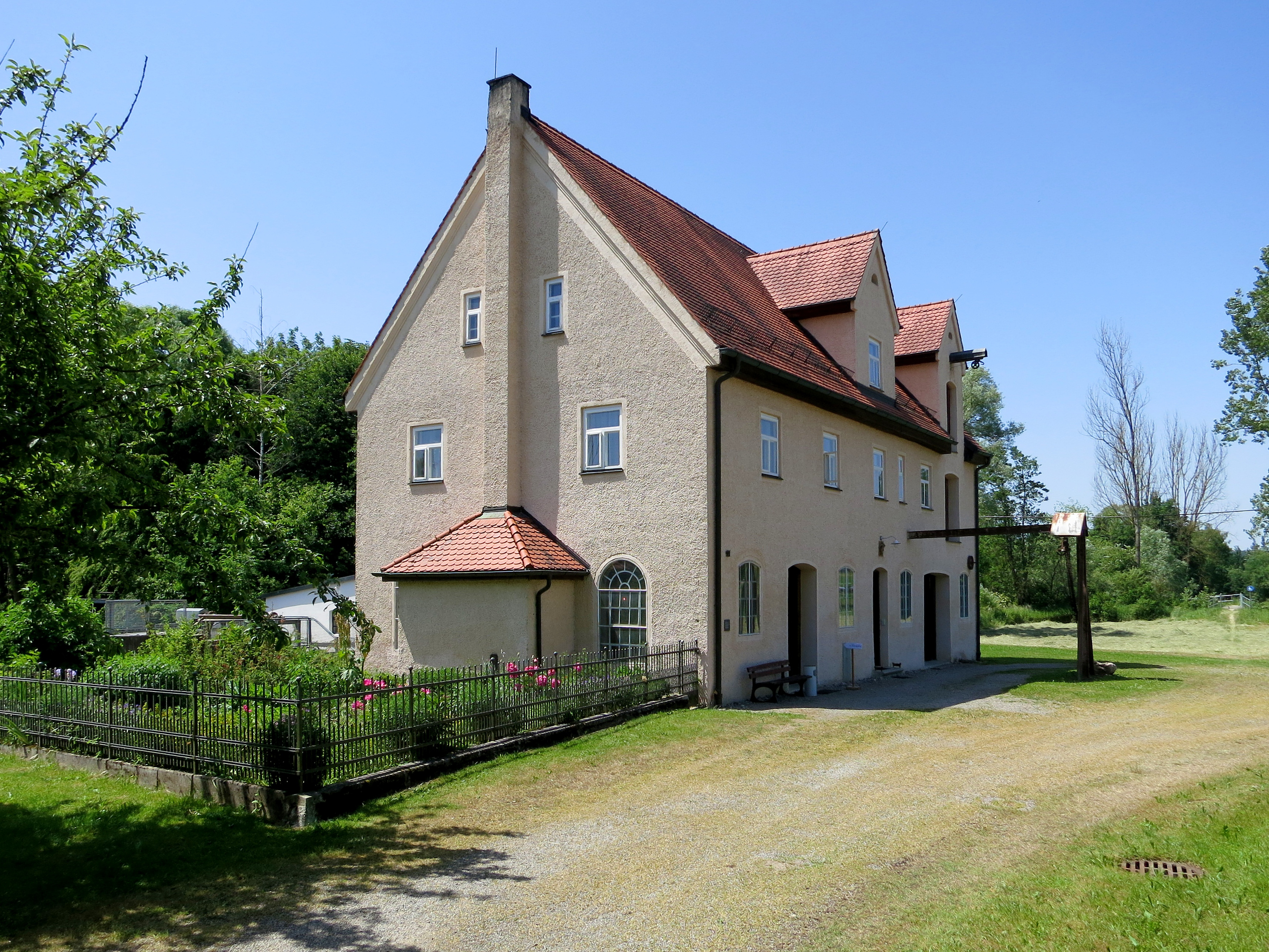 Giebel und Seitenfassade der Hammerschmiede